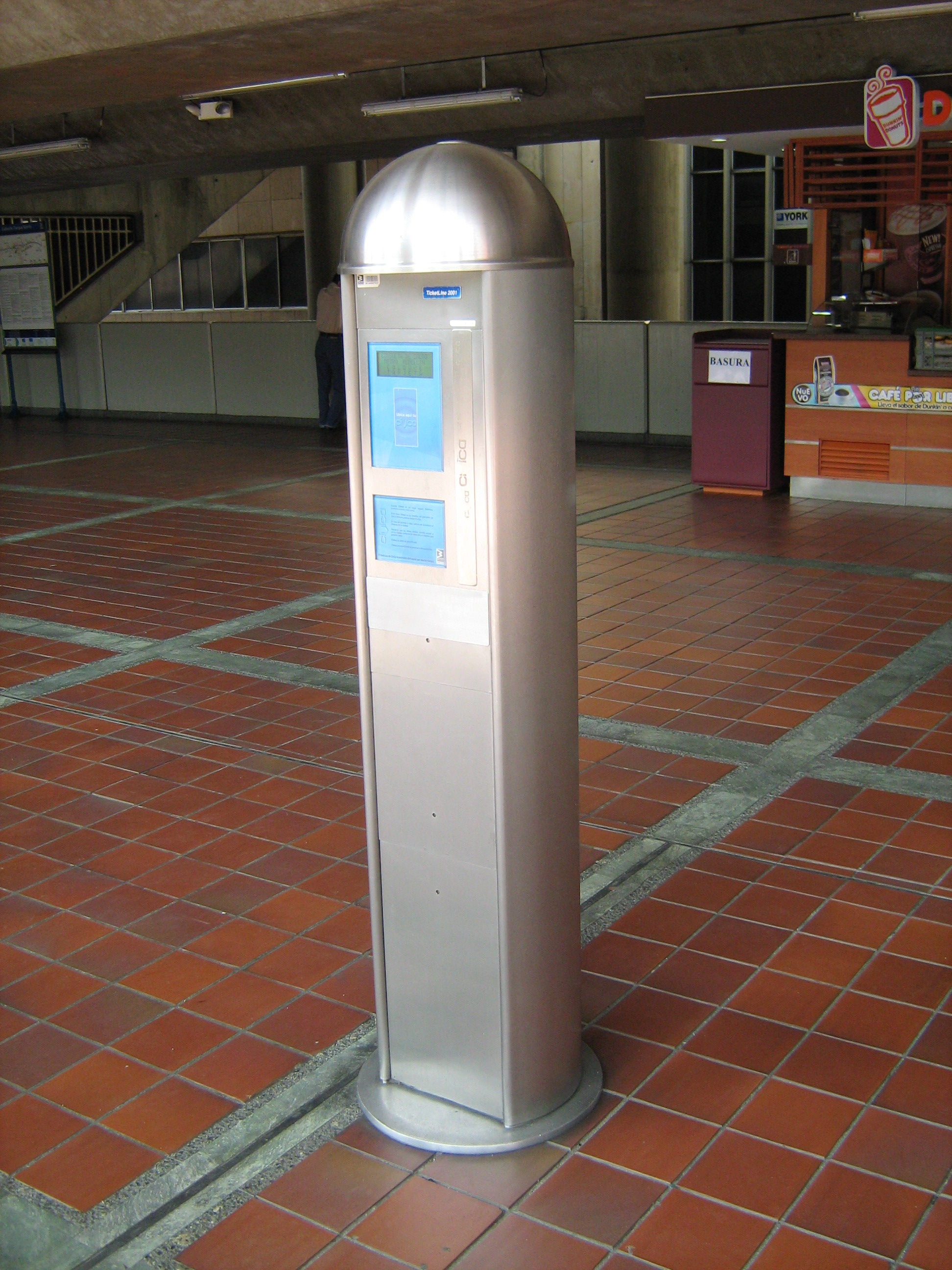 sistema digital que proporciona tiquetes en el Metro de Medellín. Colombia